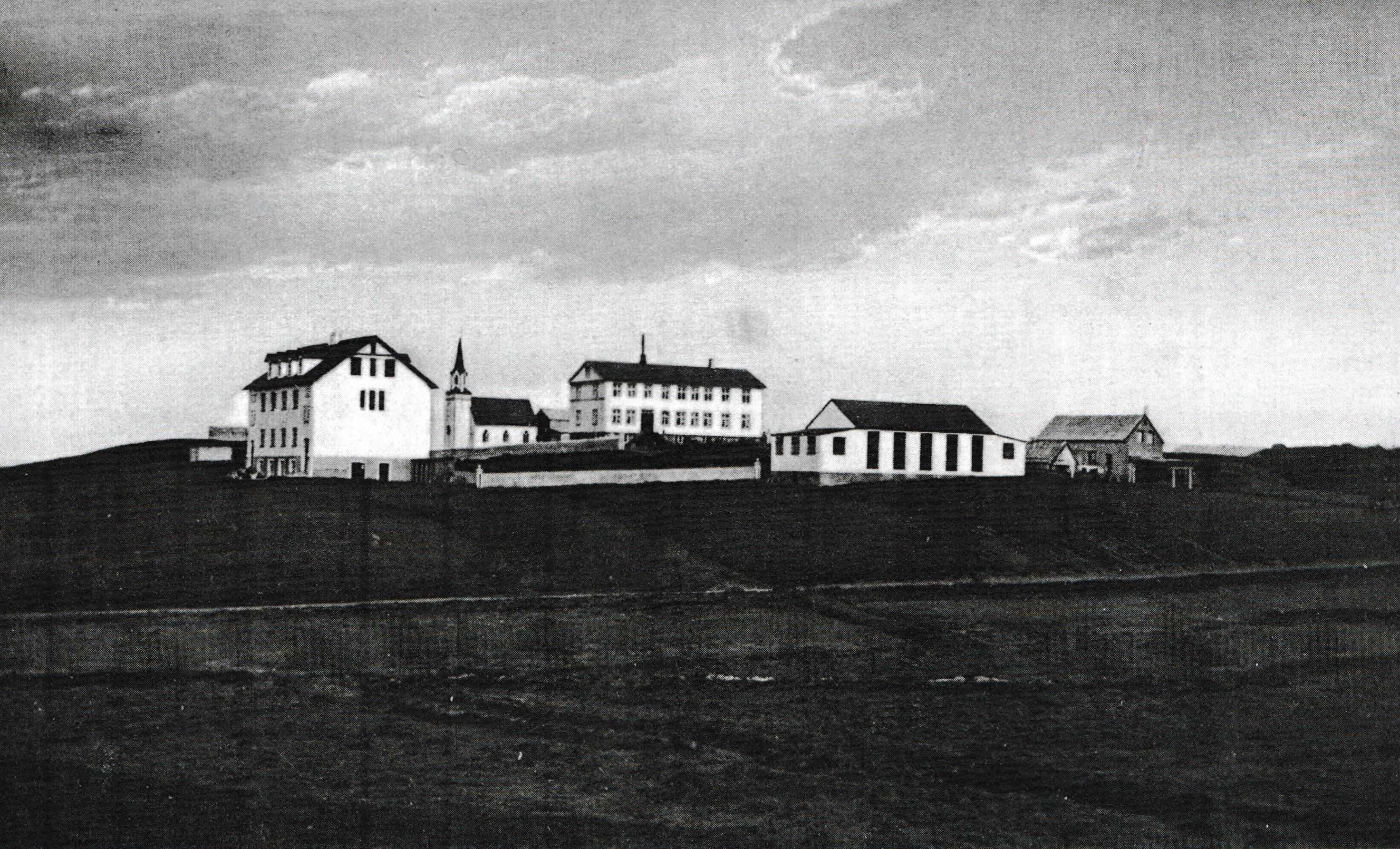 Вид на город Кваннейри, 1912 год